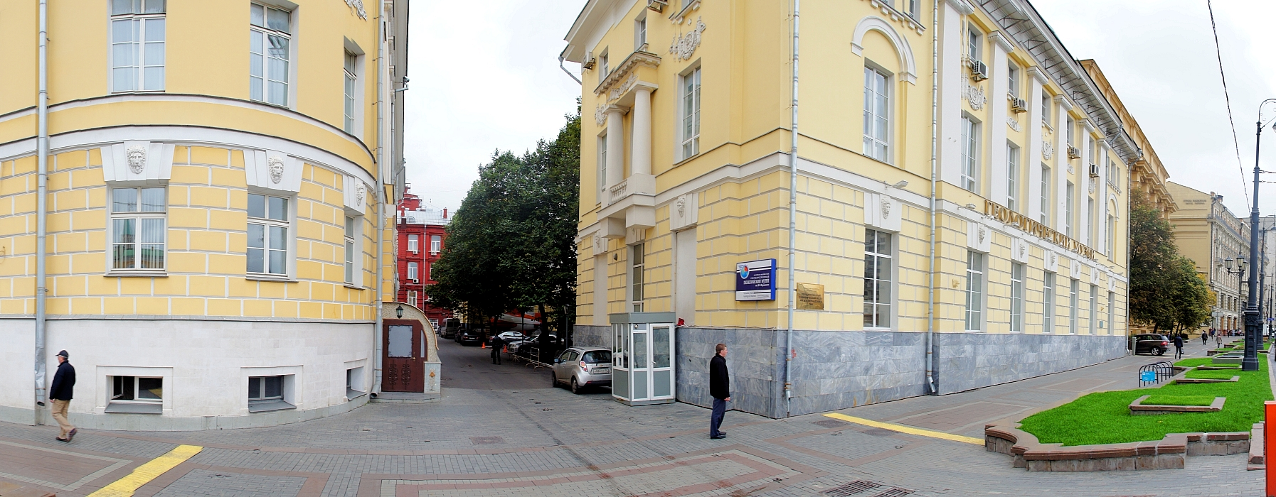 Государственный геологический музей им. В.И. Вернадского Российская академия наук